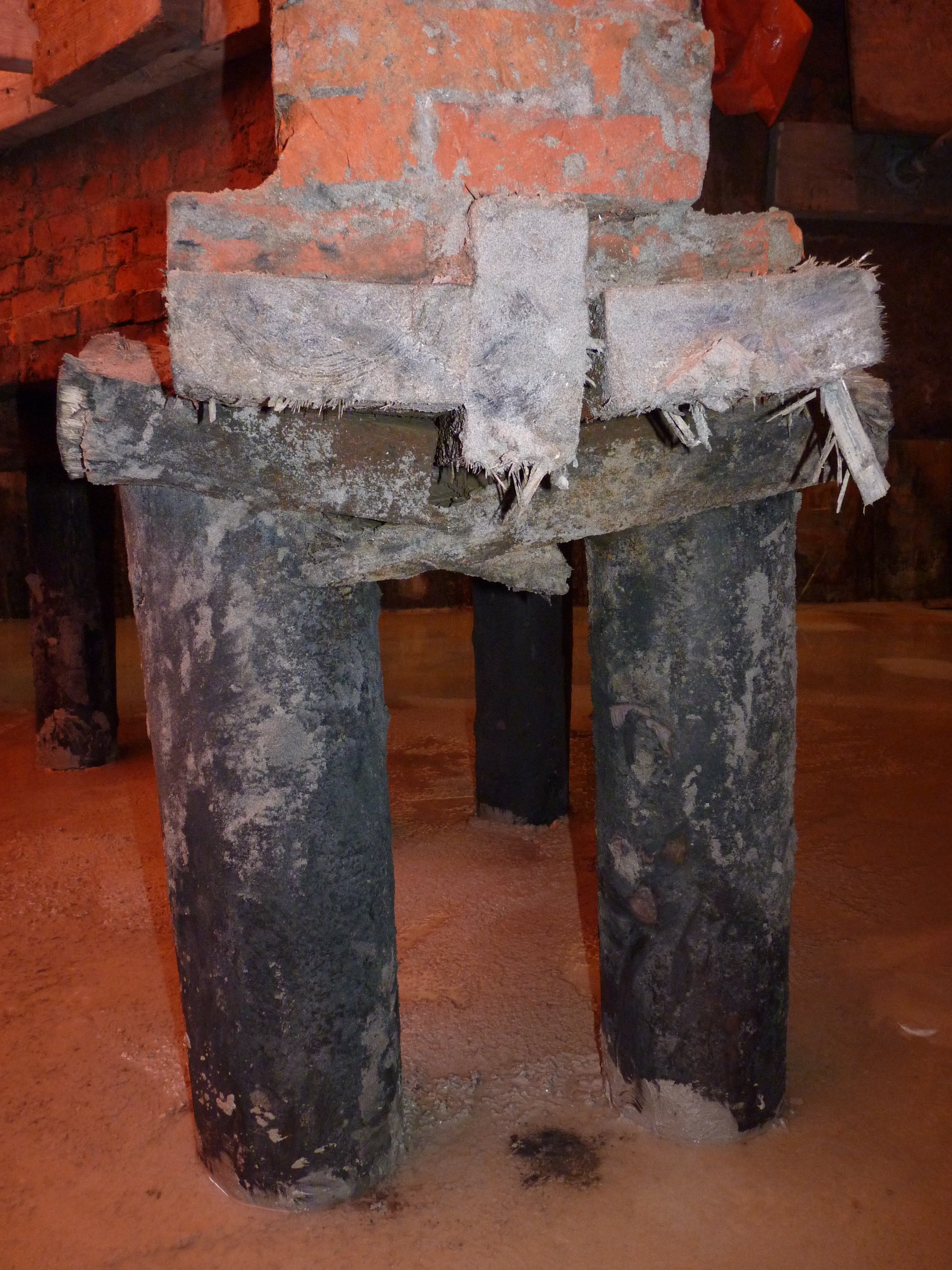 Onderdelen van een Amsterdamse houten paalfundering met hierop palen, kesp, langshout (horizontale balk), schuifhout (verticale balk) en metselwerk.